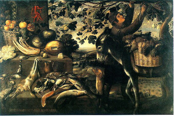 El Otoñolabel QS:Les,"El Otoño"